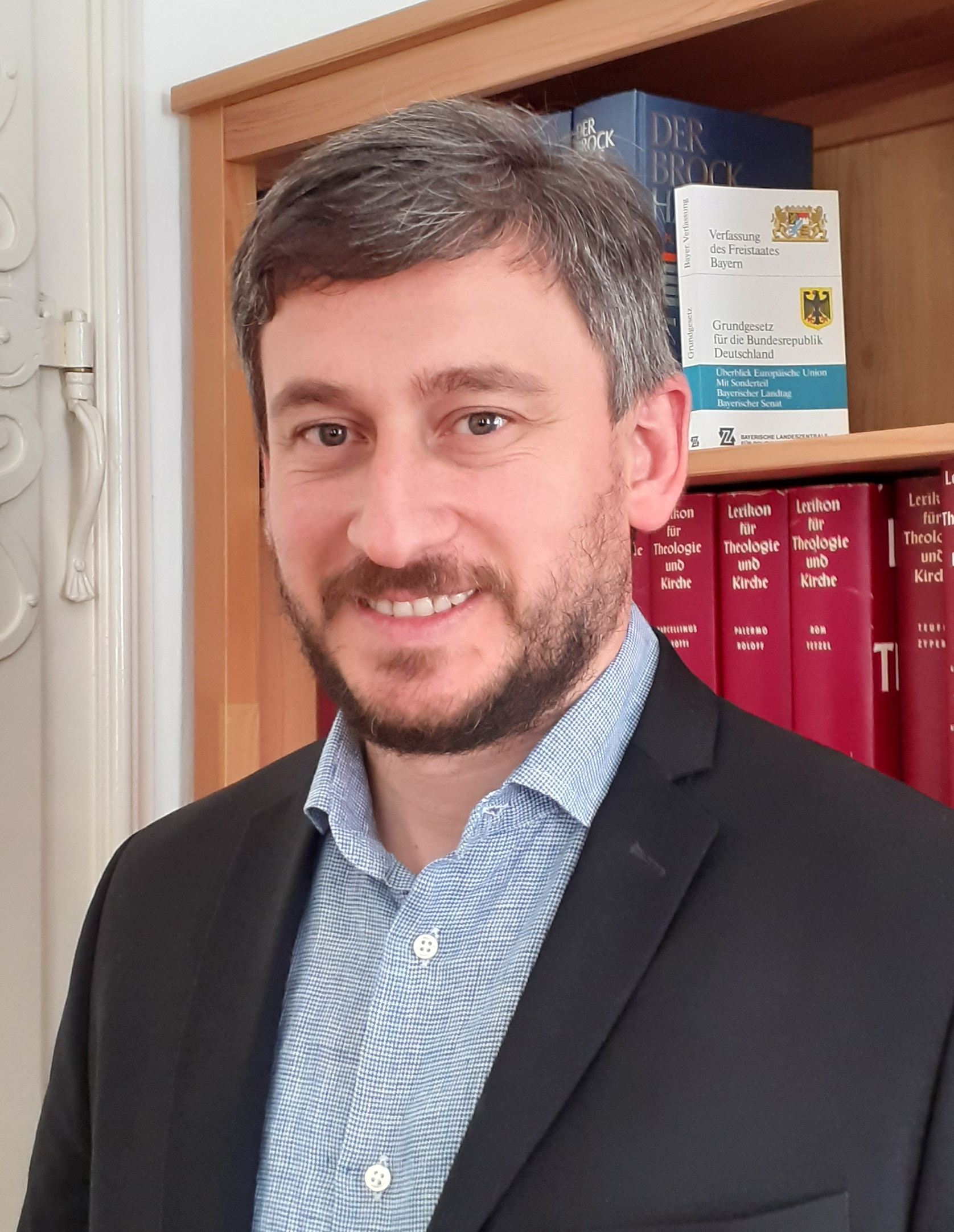 გივი ლომიძე - ქართველი თეოლოგი, თეოლოგიის დოქტორი, პედაგოგი, მეცნიერებისა და ხელოვნების ევროპული აკადემიის წევრი 2019 წლის მარტიდან.